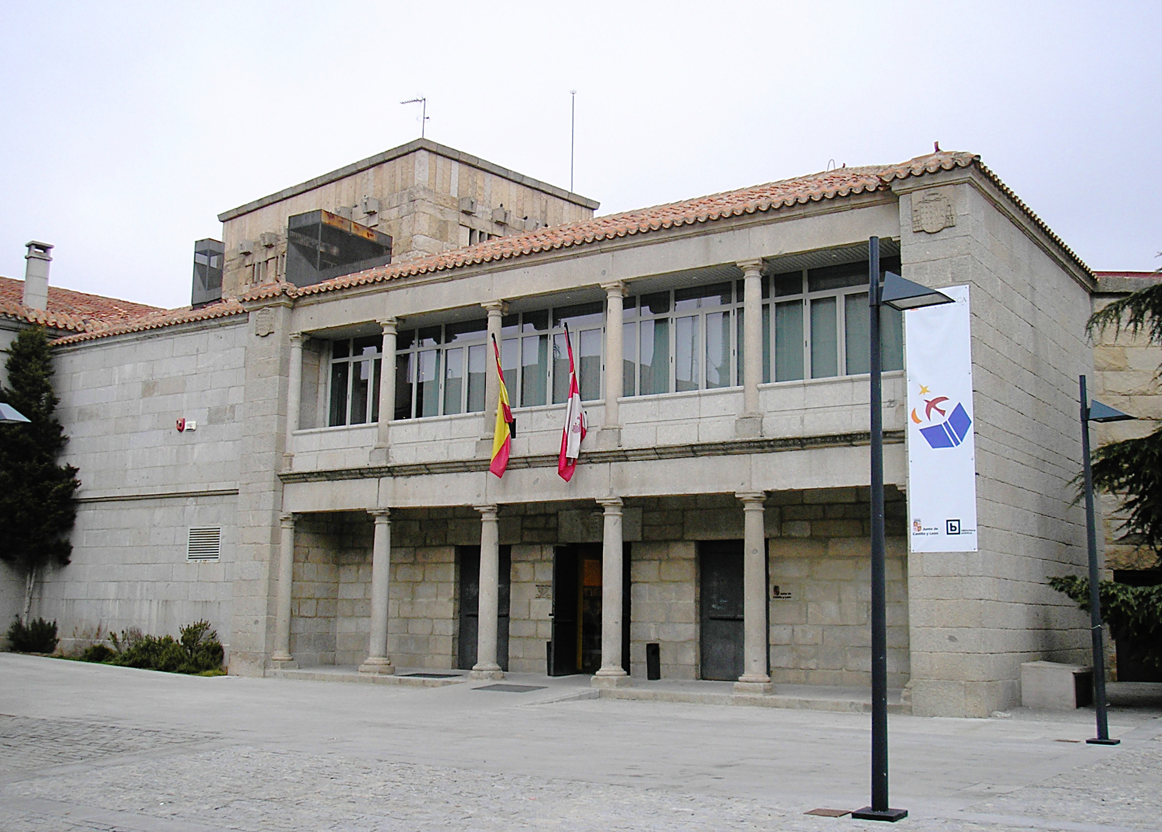 Biblioteca Pública de Ávila (España), sita en el solar del antiguo Palacio del Rey Niño.